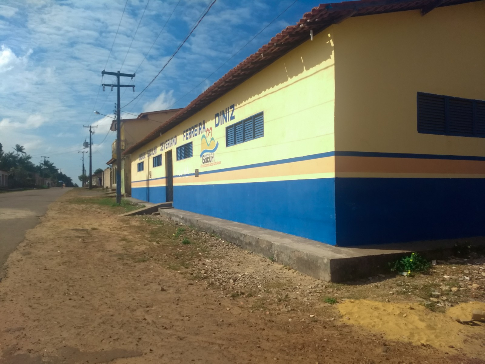 colégio de madragoa